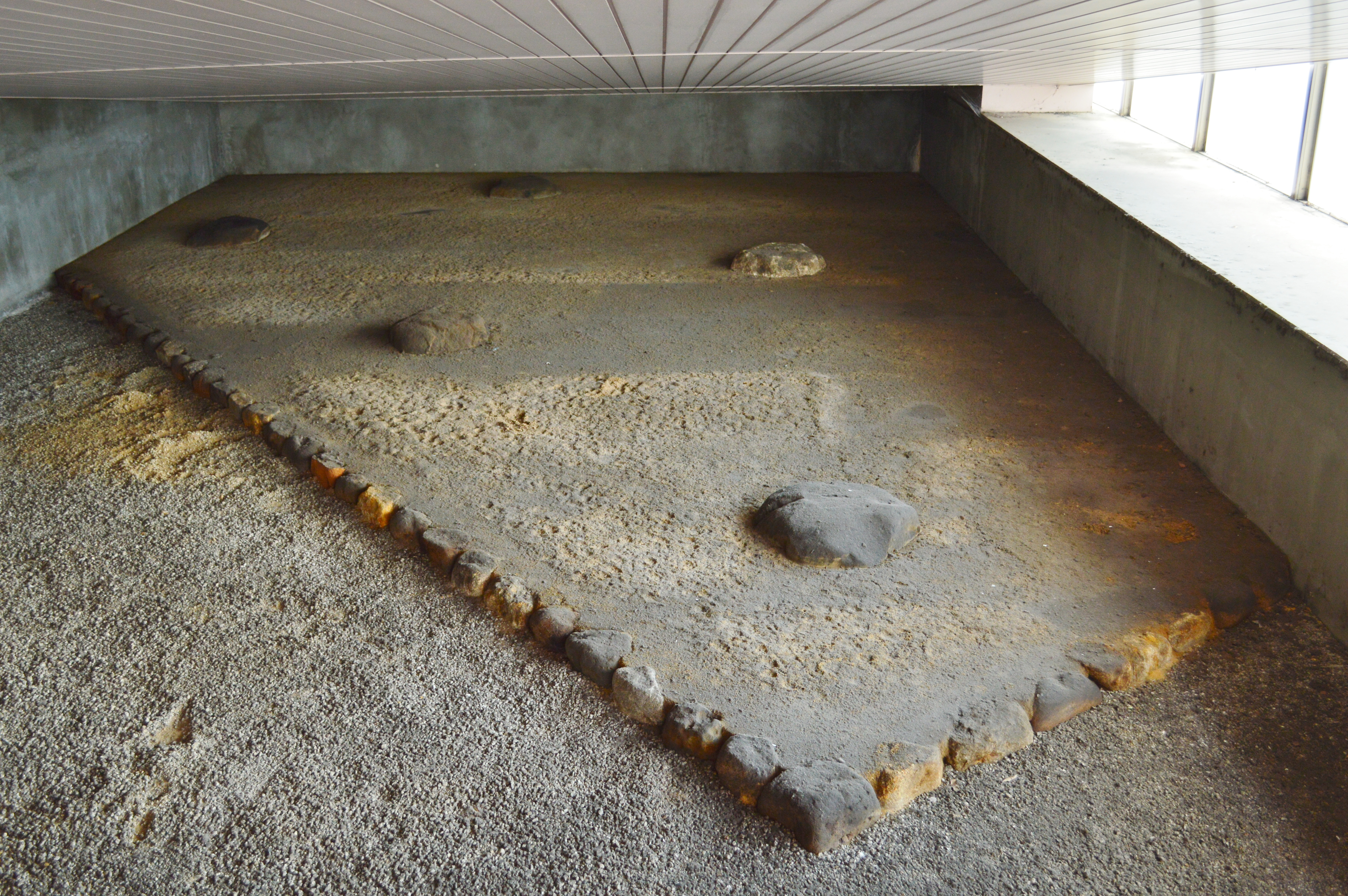 西隆寺跡 (奈良市) 回廊北東隅